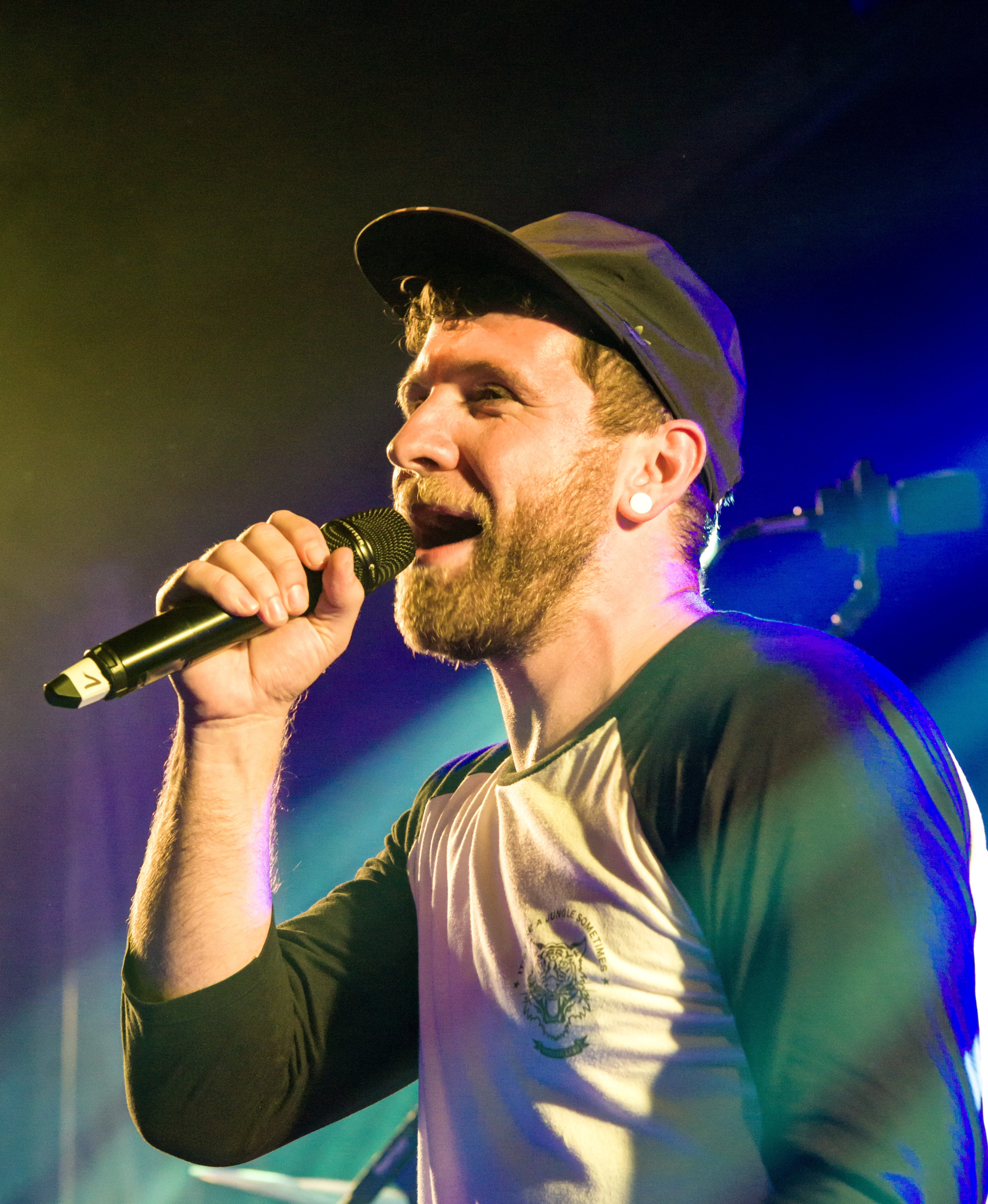 Bilder vom Zelt Musik Festival 2017 in Freiburg im Breisgau Otto Normal Konzert vom 23. 07. 2017